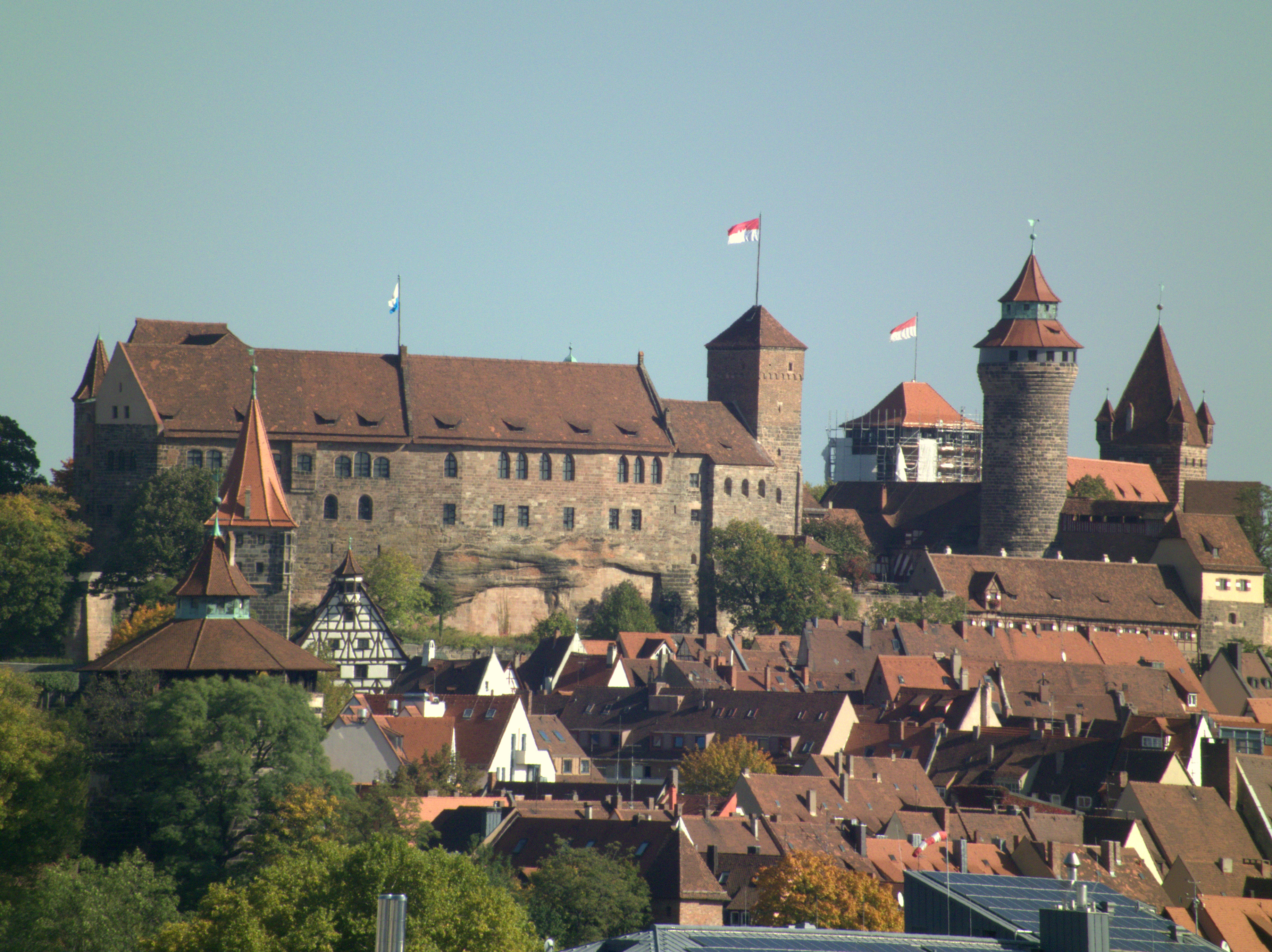 Blick von Südwesten auf die Nürnberger Burg